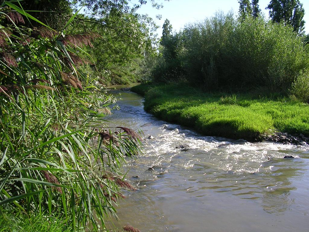 Foto del río Alhama a su paso por Alfaro (La Rioja) a 2 kilometros de su desembocadura en el Ebro